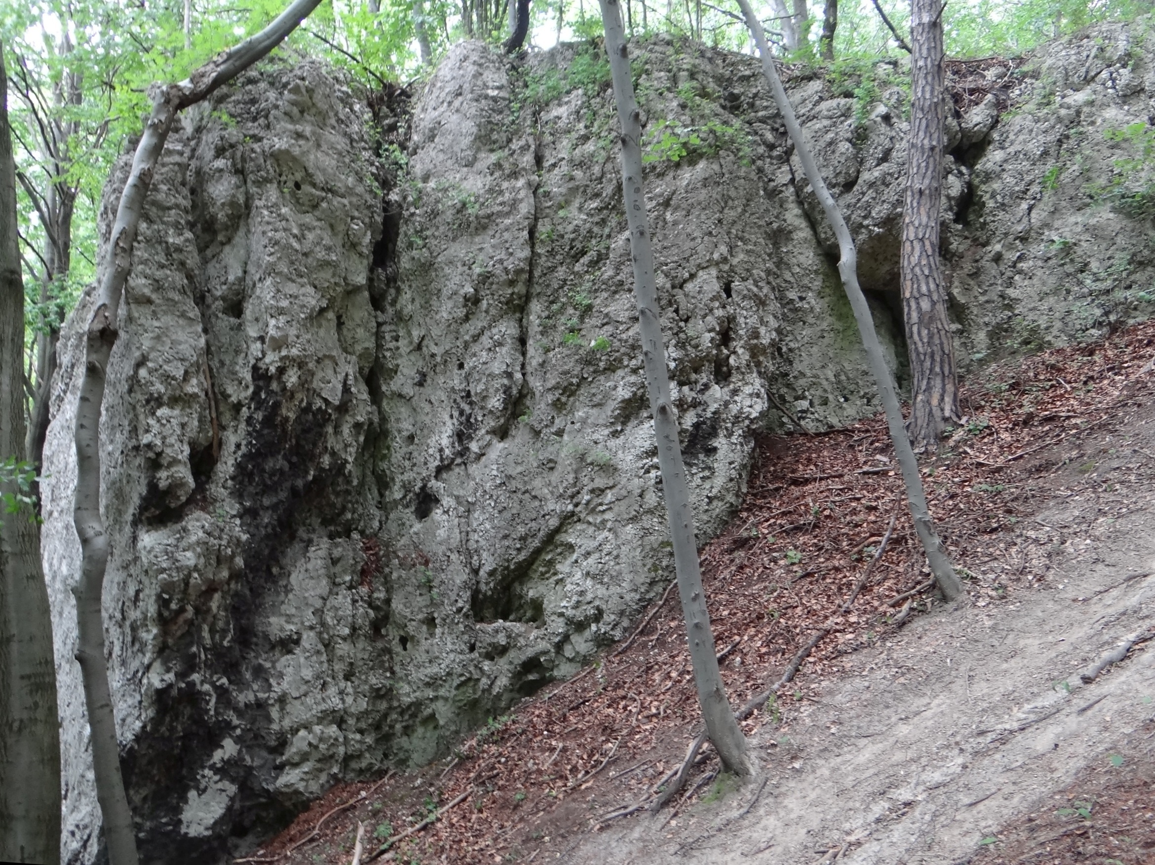 Skała Fortepian w Wąwozie Ostryszni w Imbramowicach